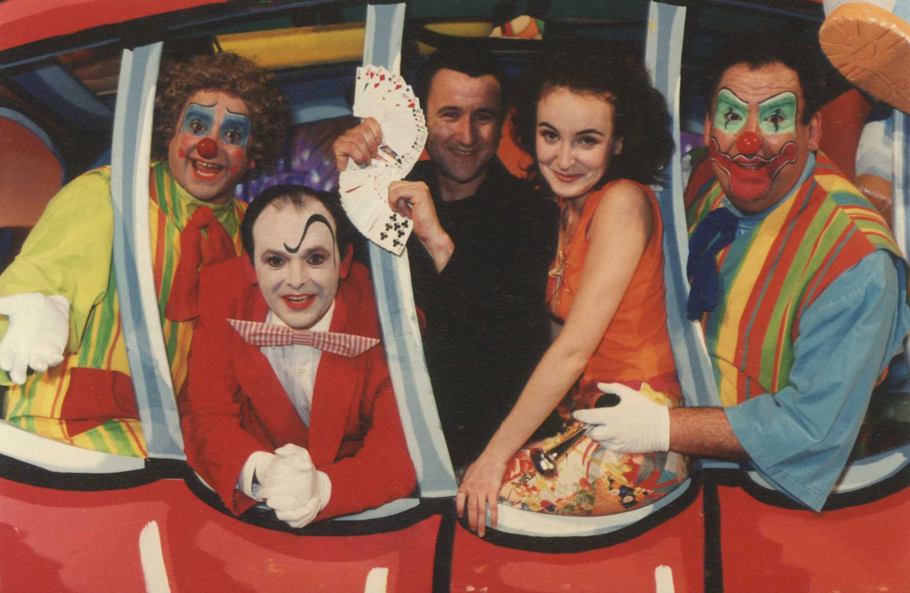 Txirri mirri